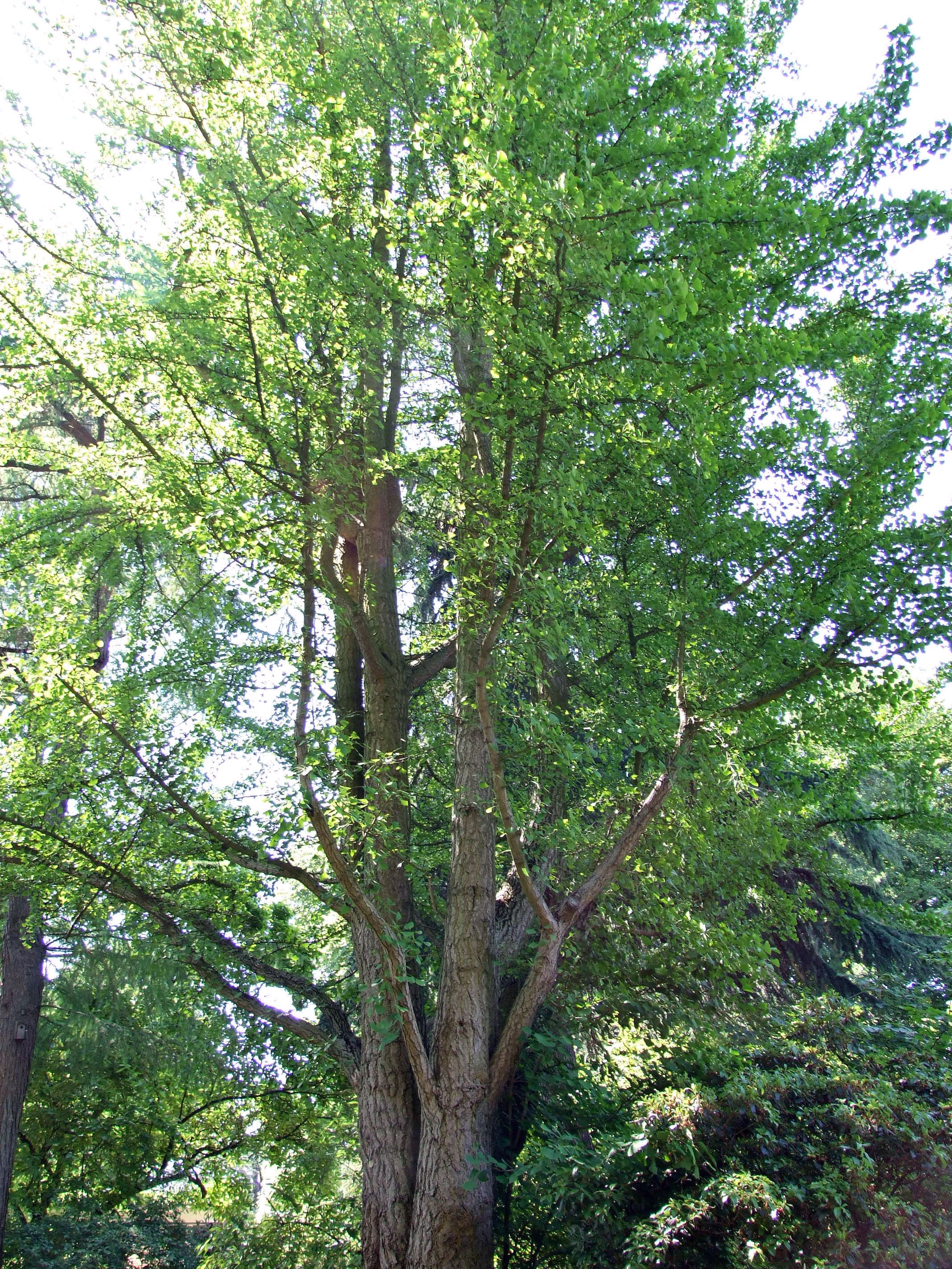 Ginkgo biloba, Botanischer Garten Ffm, Siesmayerstraße